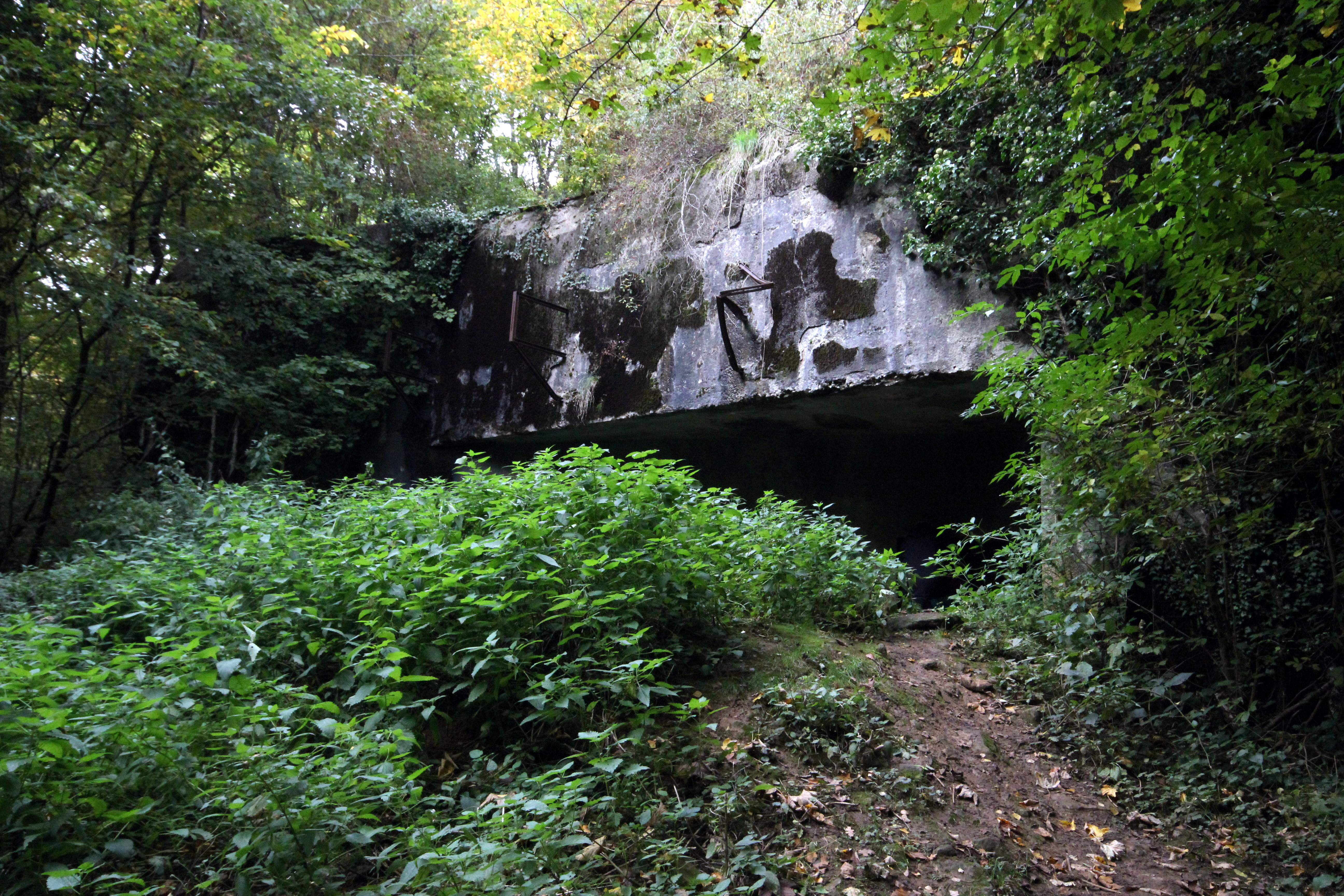 L'entrée de hommes de l'ouvrage de Bréhian